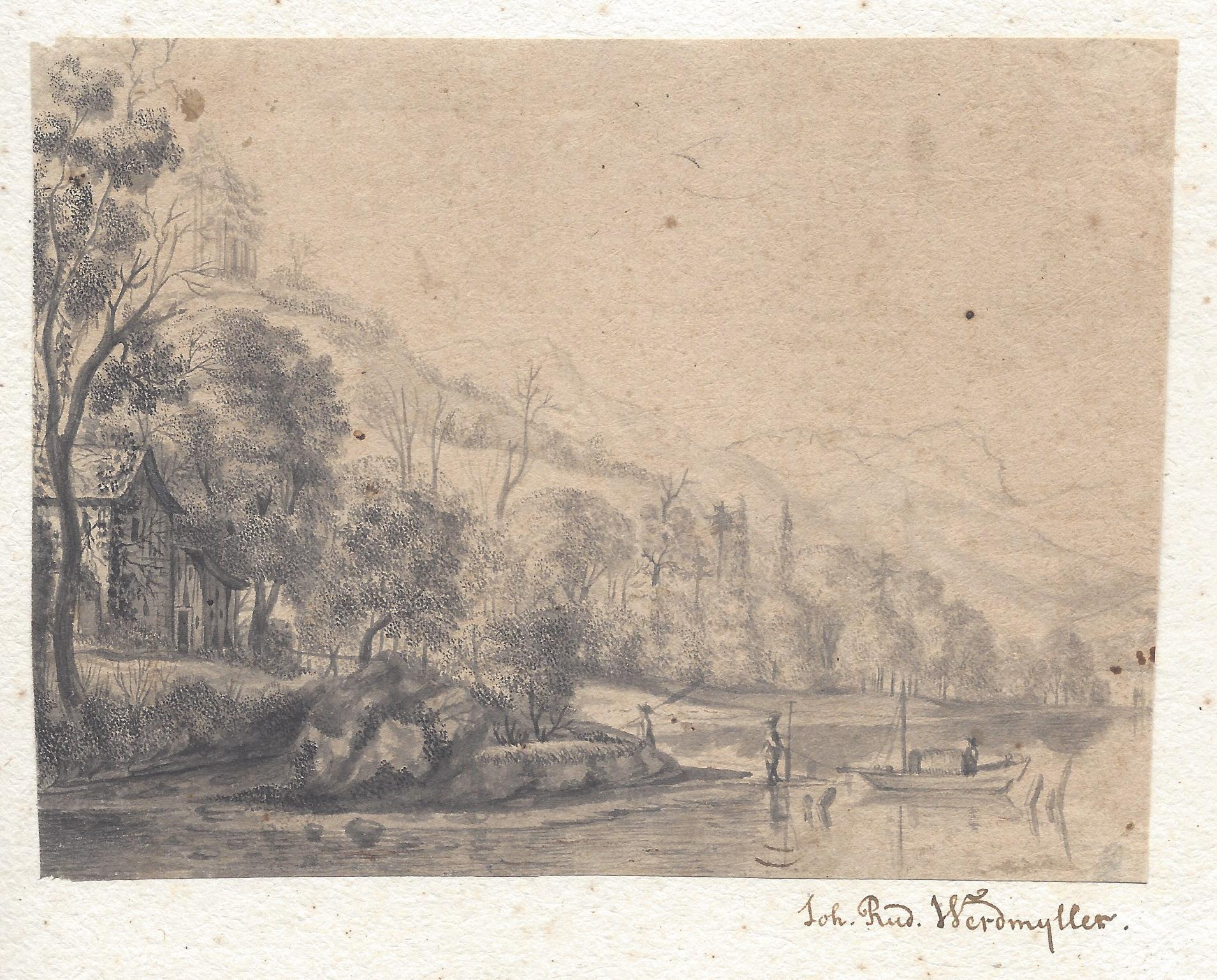 Johann Rudolf Werdmüller: Uferszene am Zürichsee, Zeichnung Tusche auf Bleistift, 11,1 x 15,2 cm, um 1660.